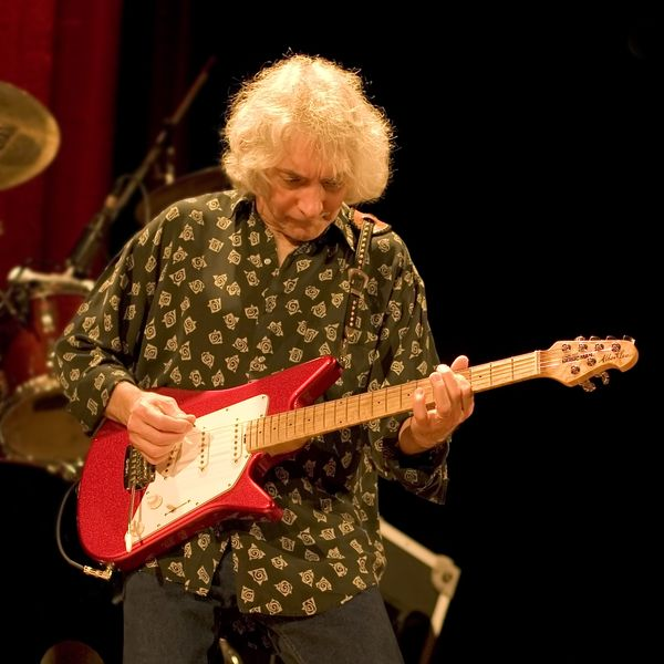 Albert Lee am 17.03.2005 im FHH in Dortmund